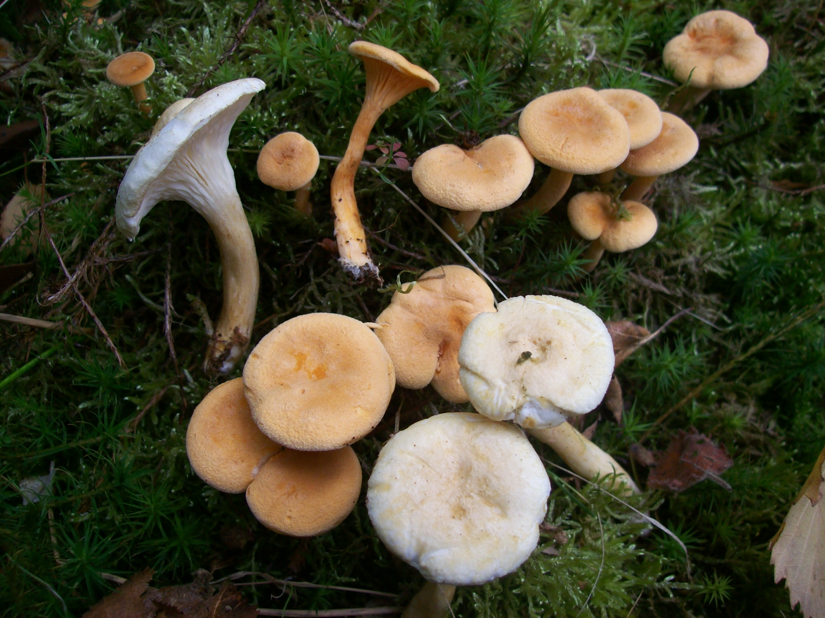 Falscher Pfifferling (Hygrophoropsis aurantiaca) normal und heller gefärbt